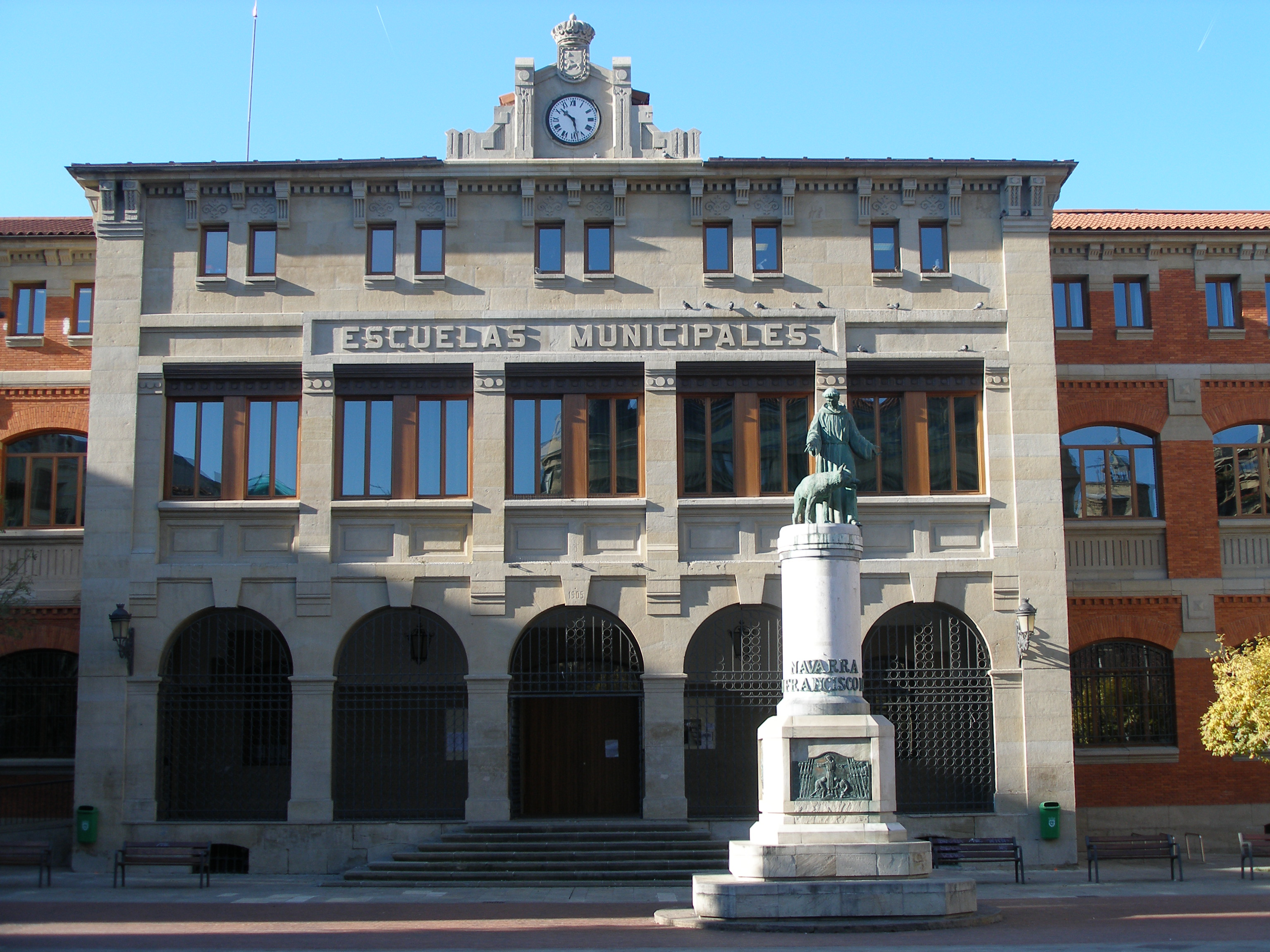 Escuelas de San Francisco de Pamplona (Navarra, España). En este solar se encontraba el convento de franciscanos hasta la desamortización del siglo XIX, con derribo del mismo en 1849. El edificio actual de la escuela se construyó en 1902 por el arquitecto Julián Arteaga.